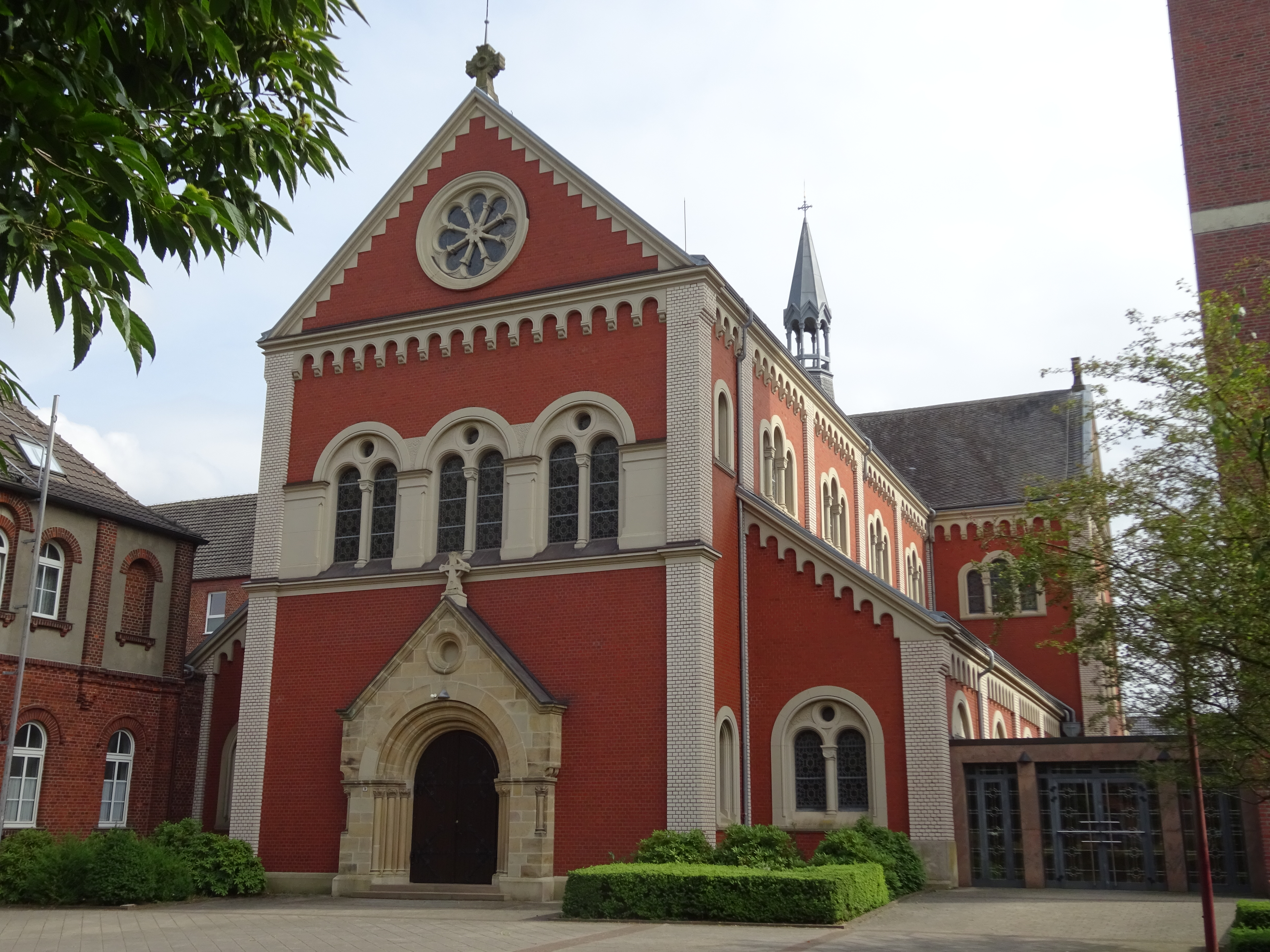 St. Marienkirche, Am Kloster 9, Maria Veen, 1903